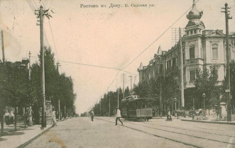 Ростов-на-Дону до Октябрьской революции. Большая Садовая улица. Доходный дом Н. И. Токарева.